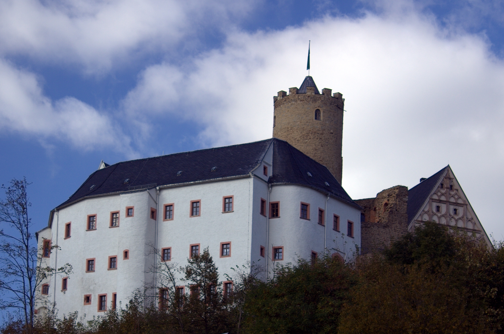 Burg Scharfenstein